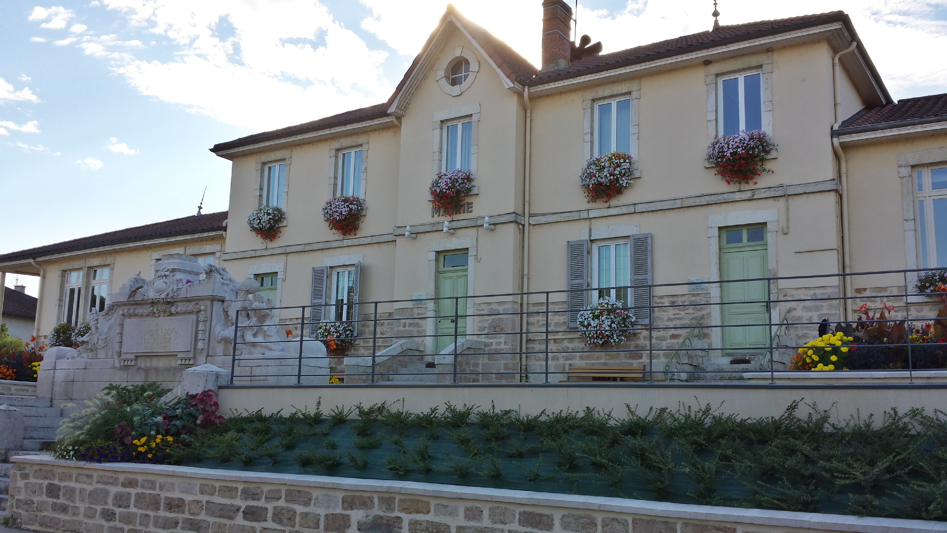 Mairie de Marboz, Ain